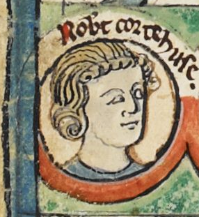 Robert Courteheuse dans un manuscrit généalogique du XIVe siècle.